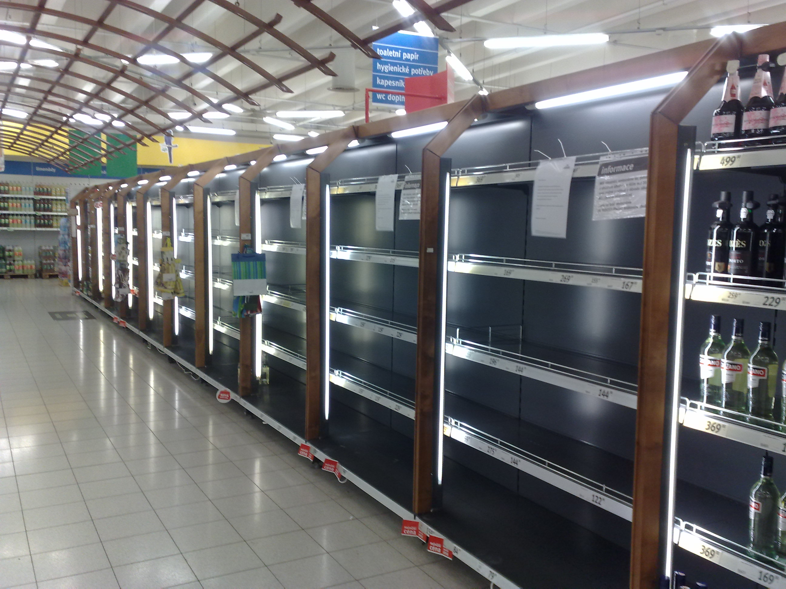 Prohibice v ČR - prázdné regály.